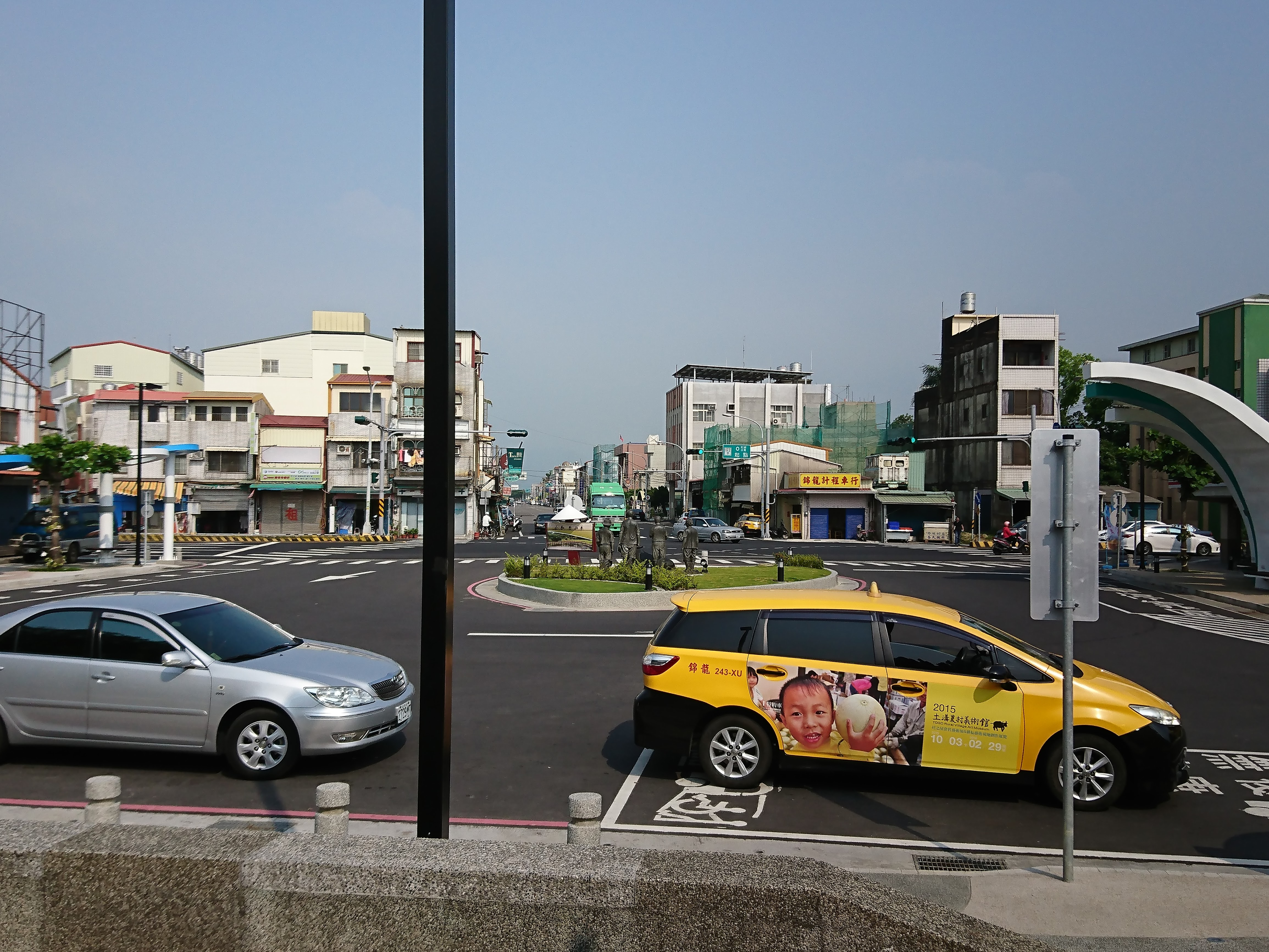 中文（台灣）: 後壁車站新站前廣場，2017年完工，具有大眾運輸轉運功能。